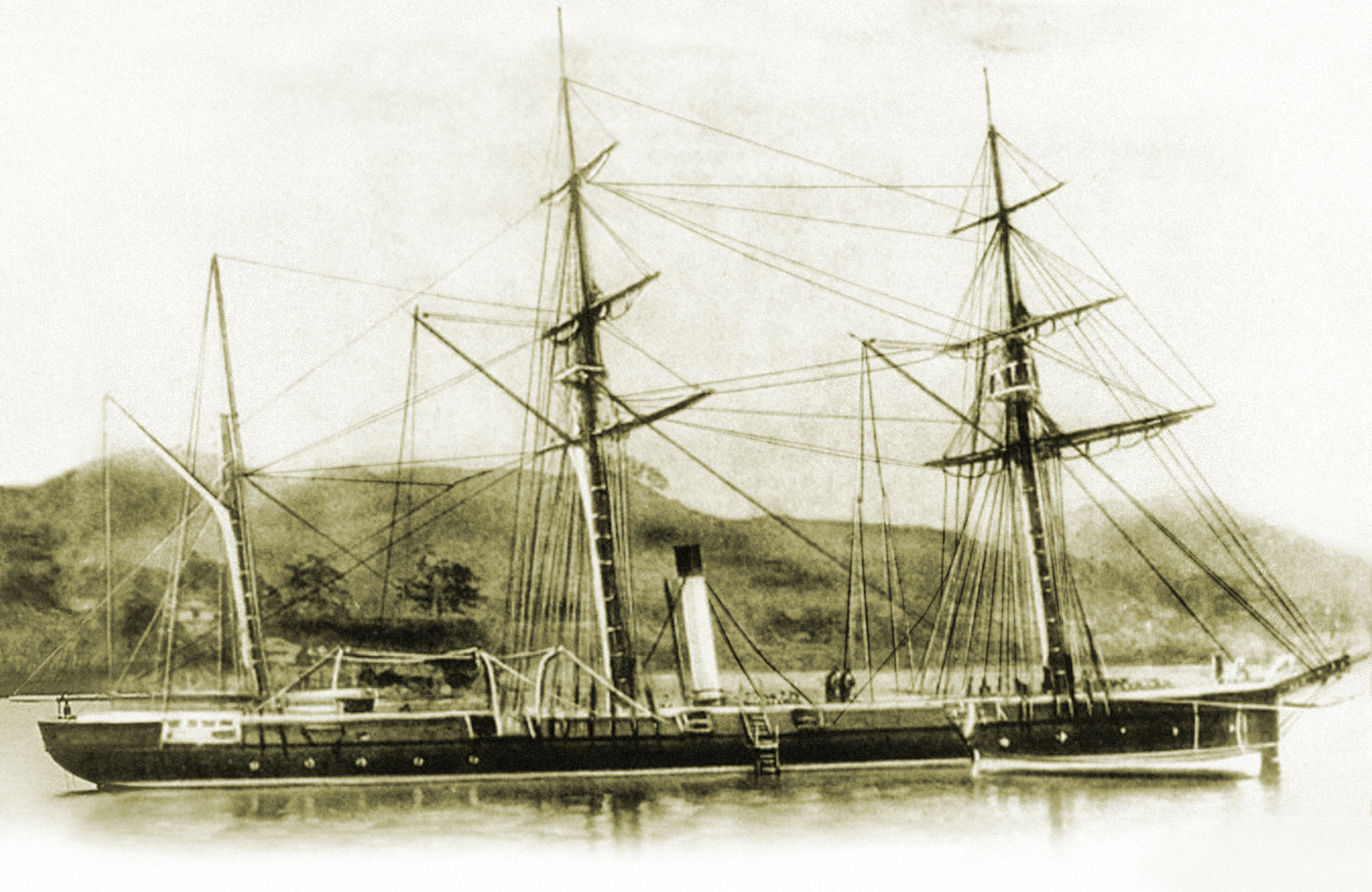 Канонерская лодка "Соболь"